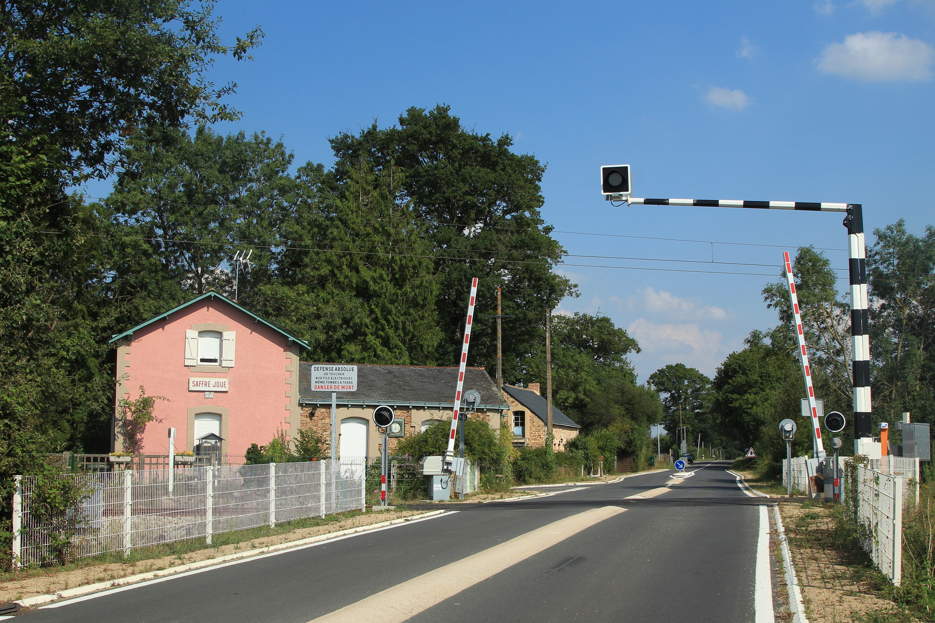 Vu du PN n° 330 et de l'ancienne halte de Saffré - Joué après l'ouverture de la ligne Nantes - Châteaubriant en tram-train.